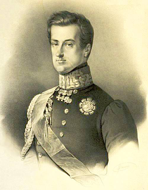 "Ritratto di Carlo Alberto di Savoia", ridotto e ritoccato, litografia